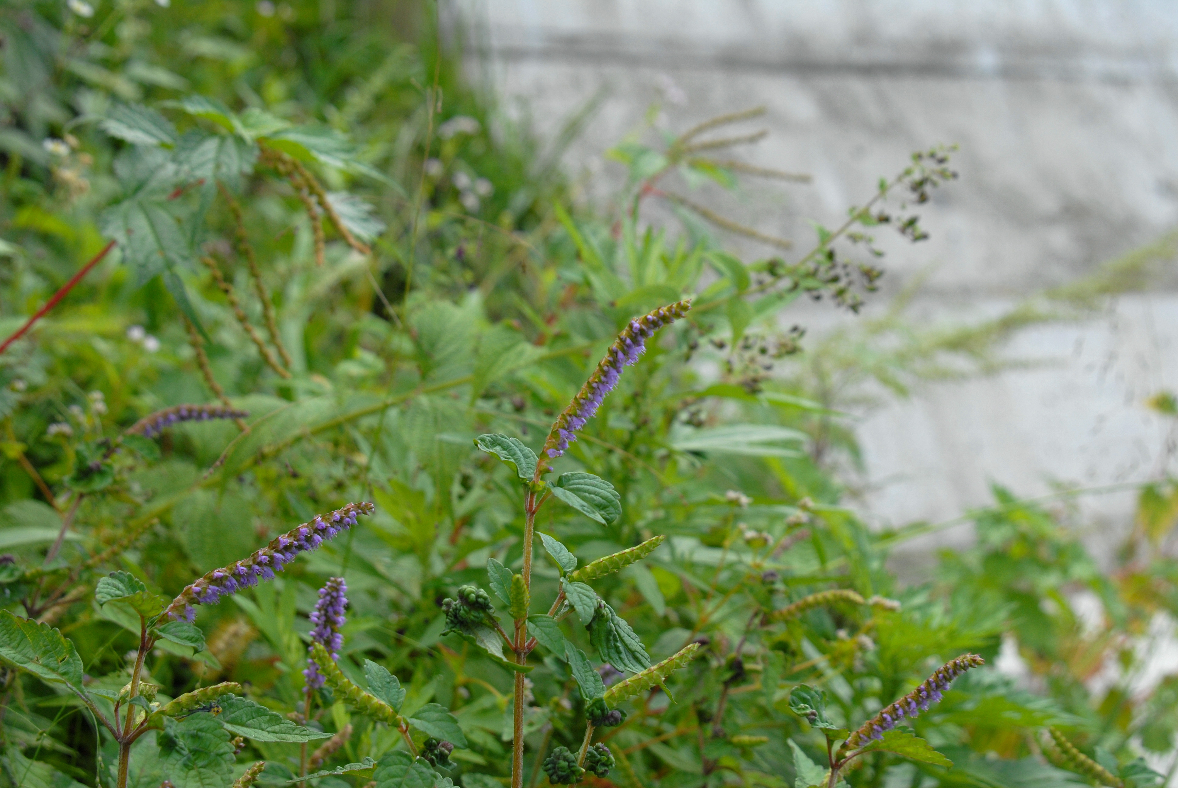 ナギナタコウジュの全景 Elsholtzia ciliata (Thunb.) Hyl.